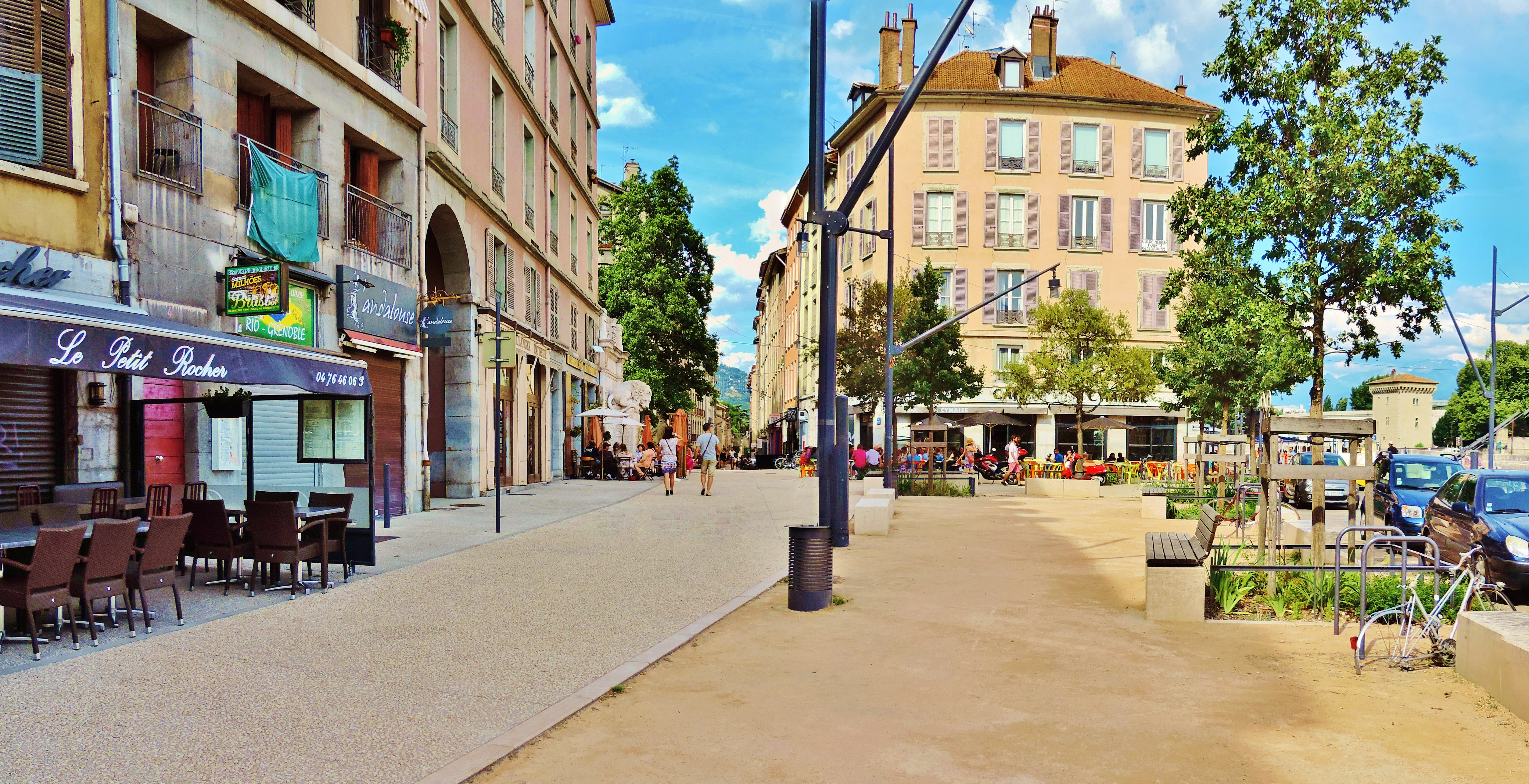 La place Cymaise et la Rue Saint-Laurent, au cœur du quartier du même nom, quais rive droite, Grenoble.